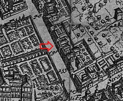 Pianta di Giovanni Battista Falda